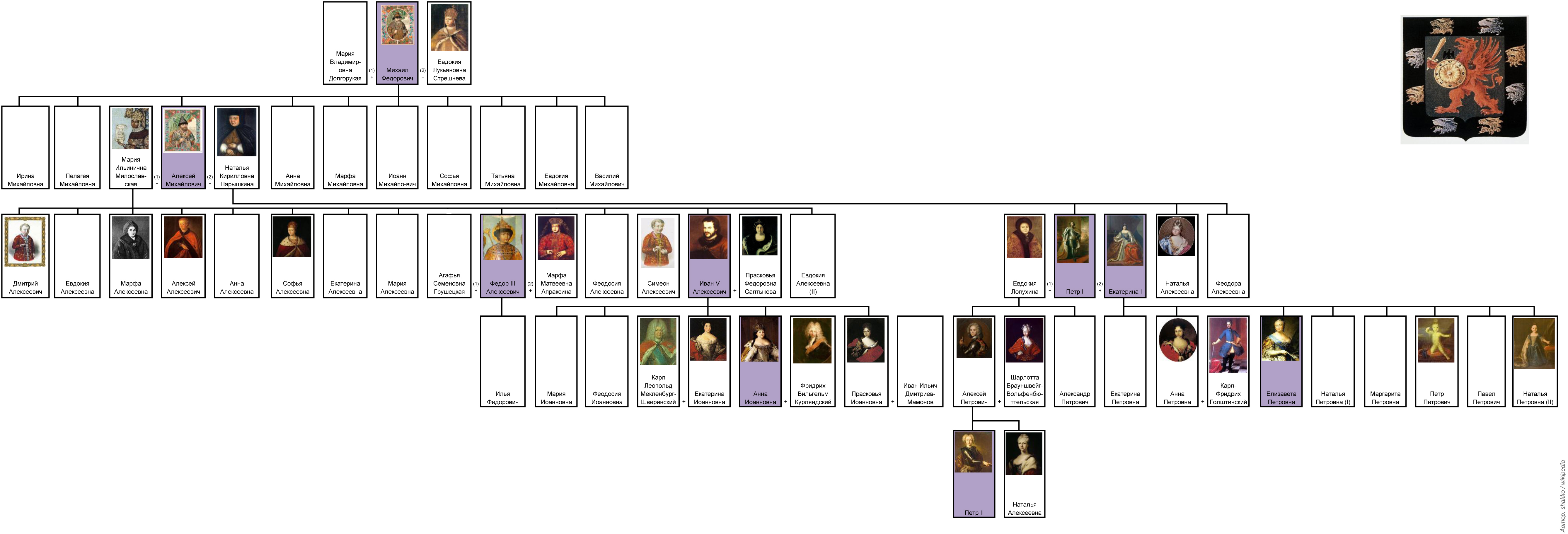 Генеалогическое древо дома Романовых (с 1613 по 1762: с восшествия на престол до пресечения в мужском колене со смертью Петра II и в женском со смертью Елизаветы Петровны)